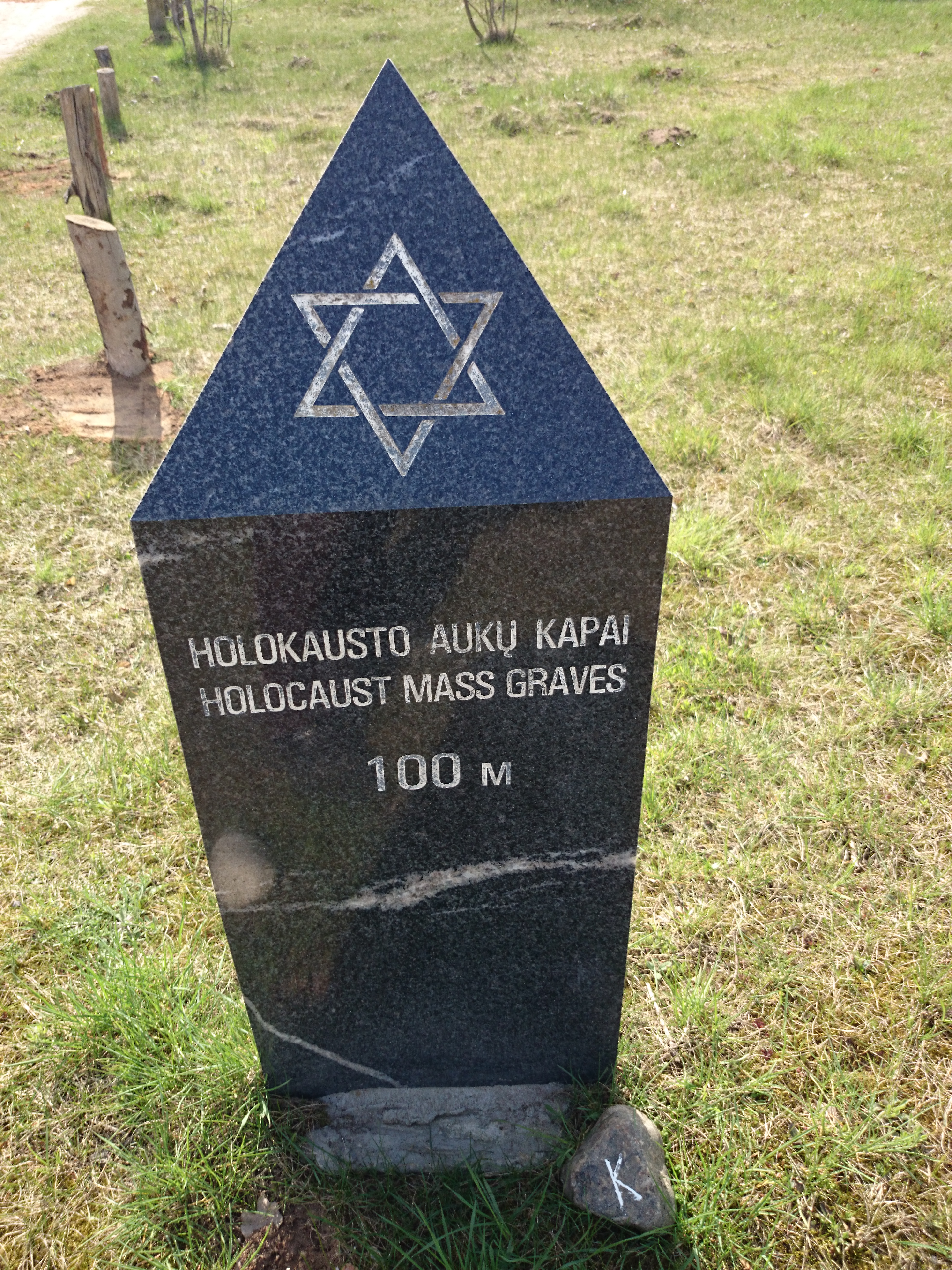 Girelė